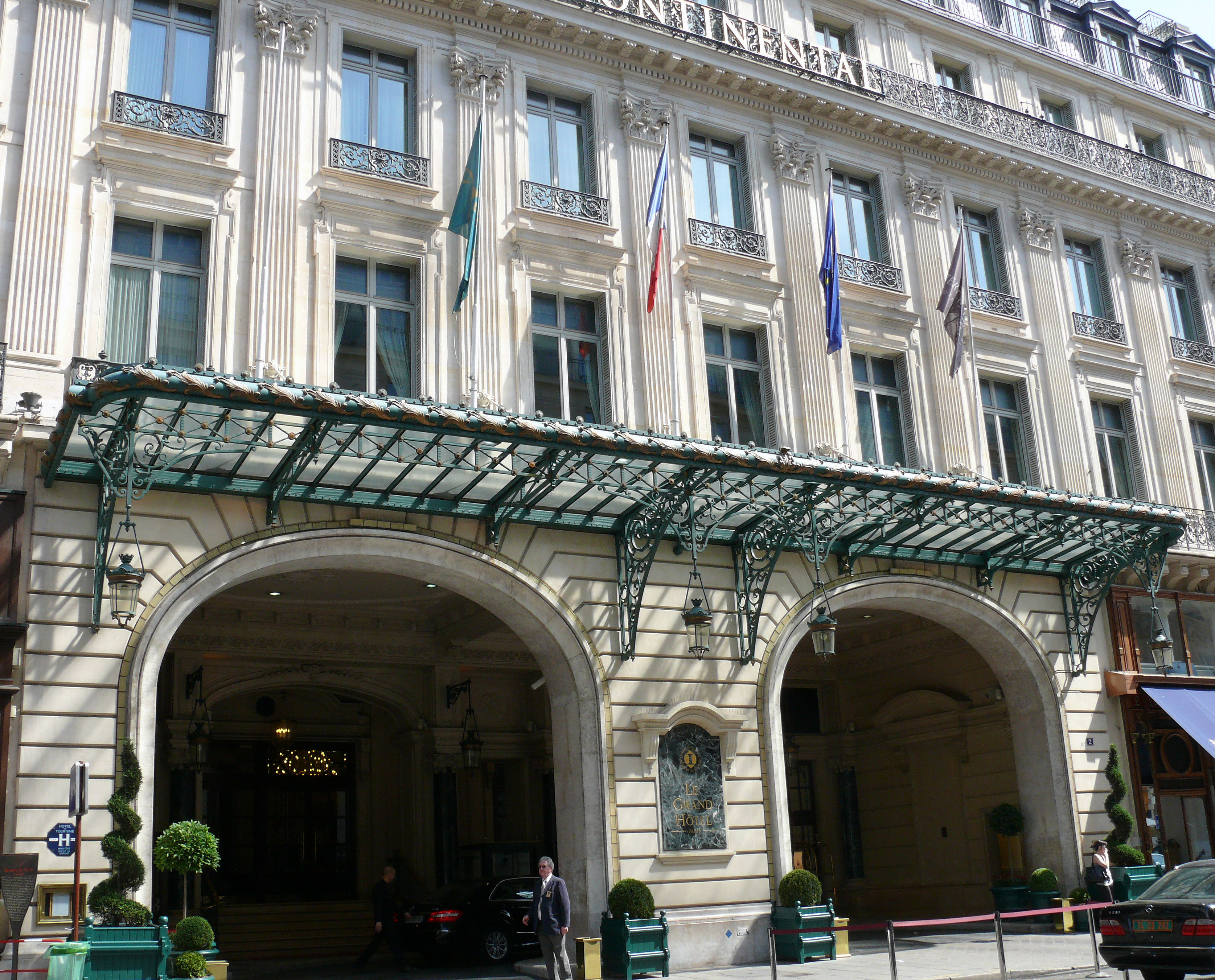 Paris 9ème arrondissement - Le Grand Hôtel, l'entrée principale rue Scribe